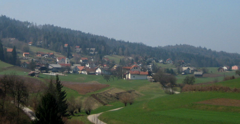 Vrhpolje, village near Moravče, Slovenia